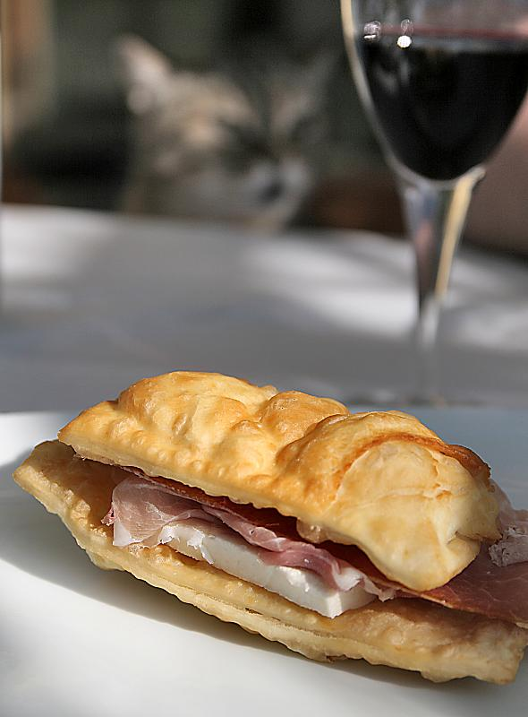 Gnocco fritto